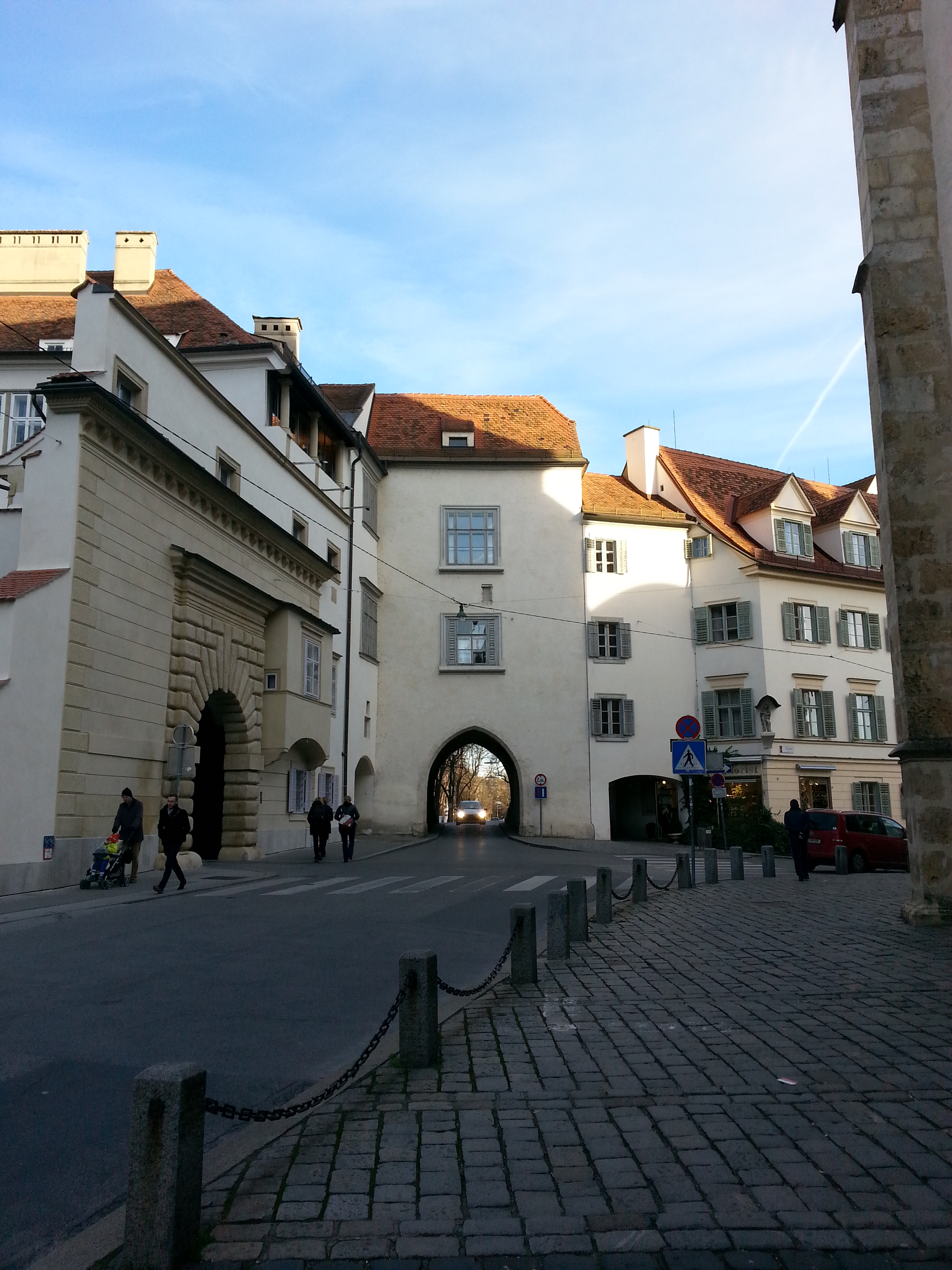 Blick auf die Grazer Burg (li.) und das Grazer Burgtor.